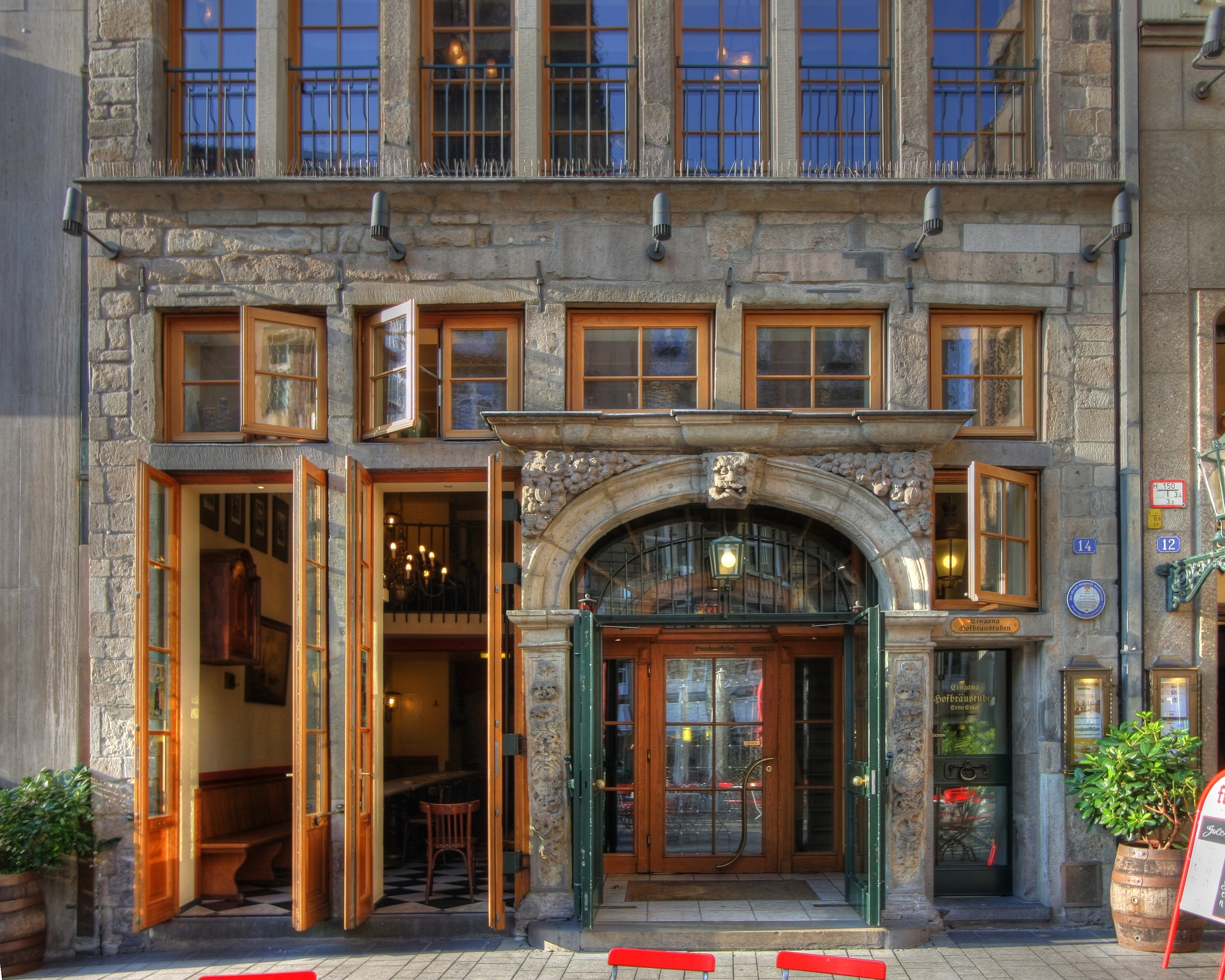 Früh Brauhaus, Am Hof 14, 50667 Köln. Erbaut: 1691; ursprünglicher Name: „Zur Glocke“